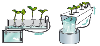 В этом методе, питательный раствор постоянно циркулирует тонким слоем и обеспечивает большую площадь соприкосновения воздуха с водой. Это самый распространенный способ выращивания скороспелых культур, салатов и кулинарной зелени. Подобную NTF систему можно самостоятельно собрать в домашних условиях из пластмассовых водостоков и выращивать на лоджии цветы, зелень или ягоды.